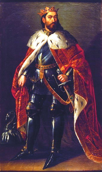 Retrato imaginario del rey Jaime I de Aragón (1208-1276), que fue hijo del rey Pedro II de Aragón y de la reina María de Montpellier.